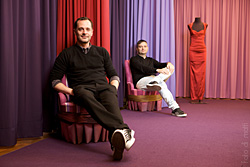 Doppel-Portrait von Johnny Talbot (* 1964) und Adrian Runhof (* 1963), fotografiert von Matti Hillig. Das Bild wurde am 14. Januar 2009 in MÜnchen aufgenommen. Die Beiden gründeten 1992 das Modelabel „All About Eve“ und benannten es im Jahr 2000 in Talbot Runhof um. Höhere Auflösungen von diesem und weiteren Fotos sind erhältlich bei